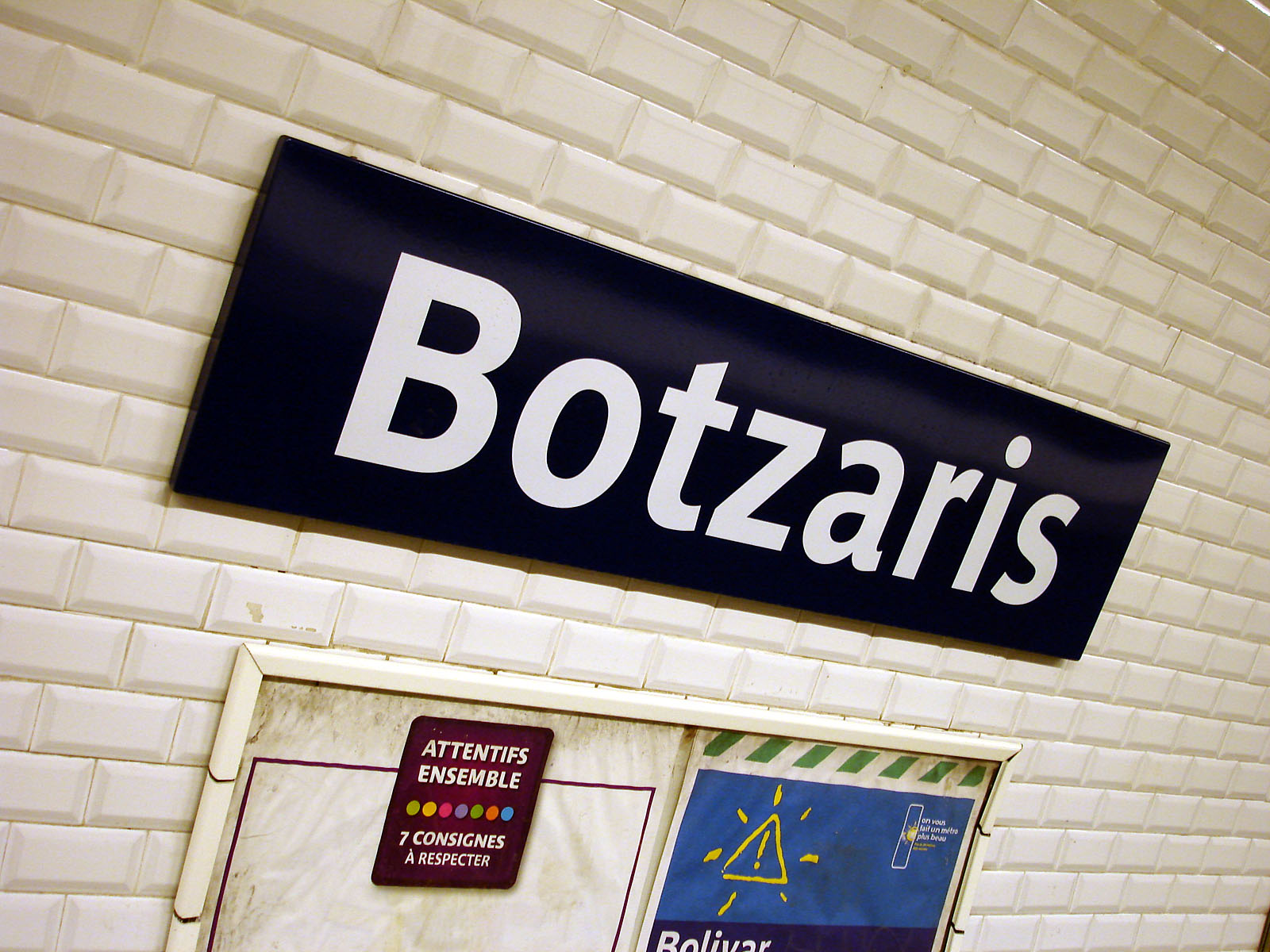 Station Botzaris de la ligne 7 bis du métro de Paris, France.